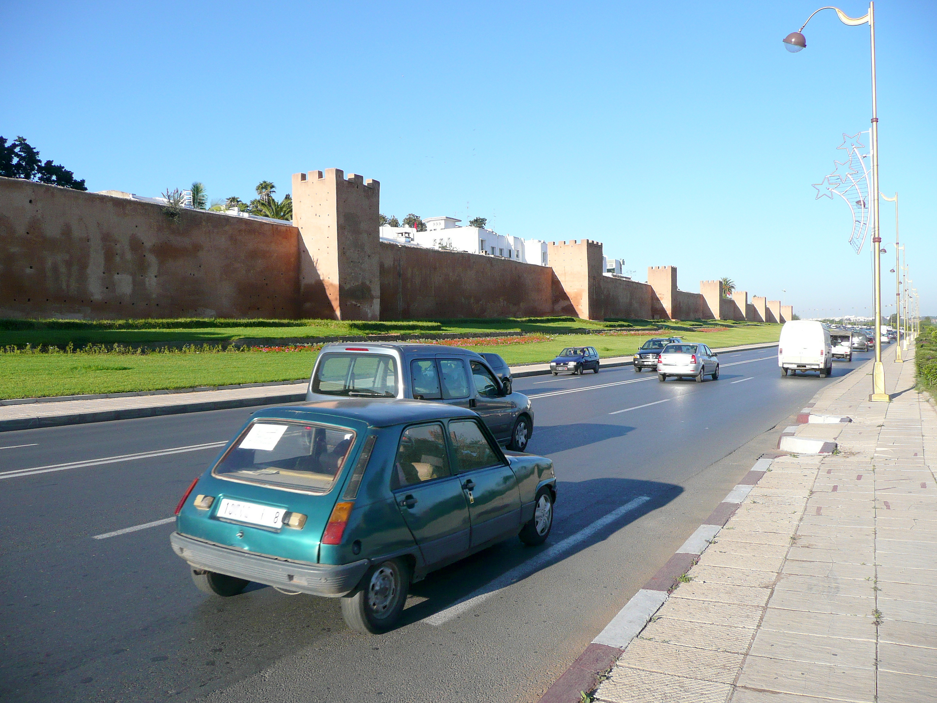 Le rempart de Rabat longé par une voie routière moderne (Maroc)